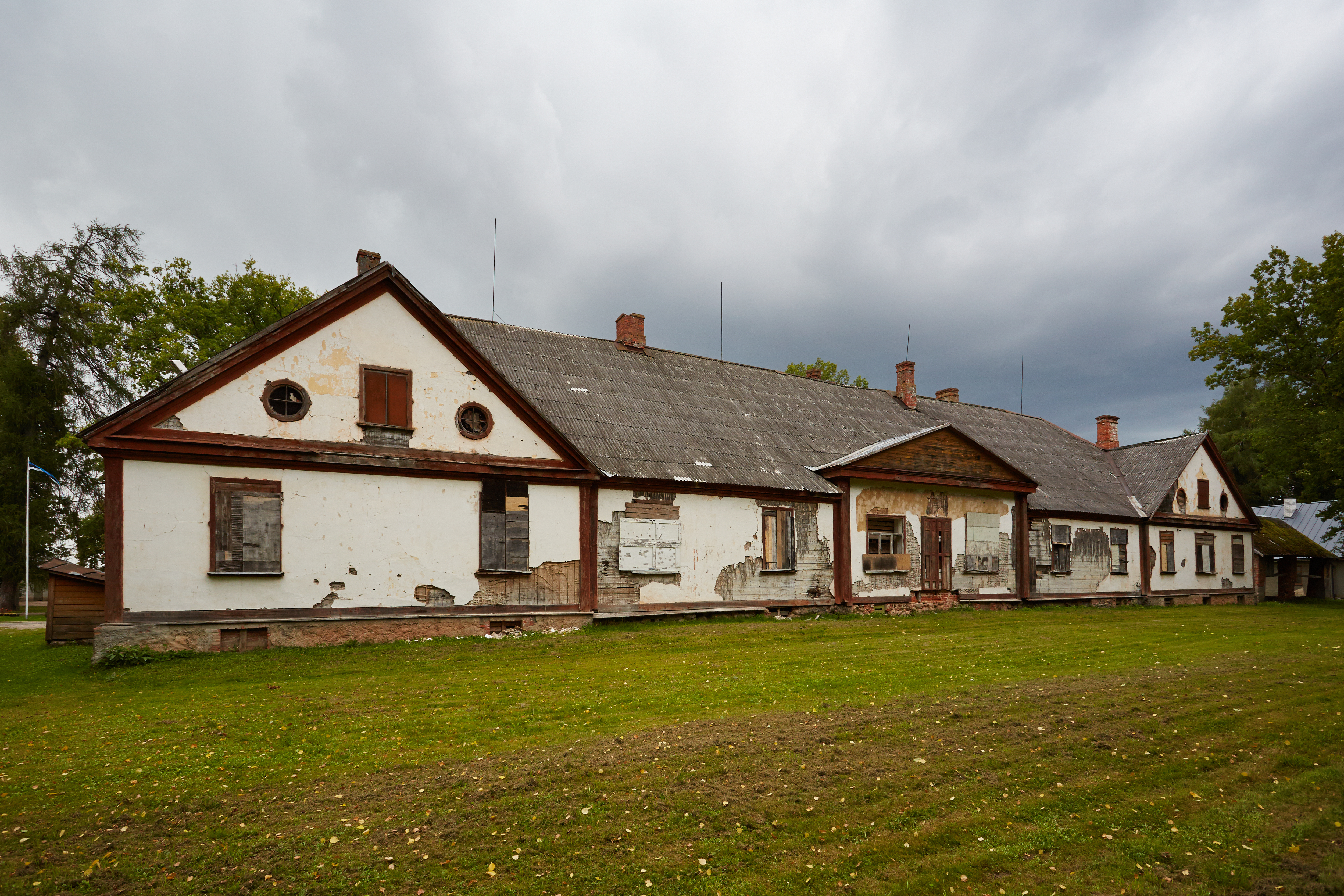 Tilsi mõisa peahoone tagantvaade